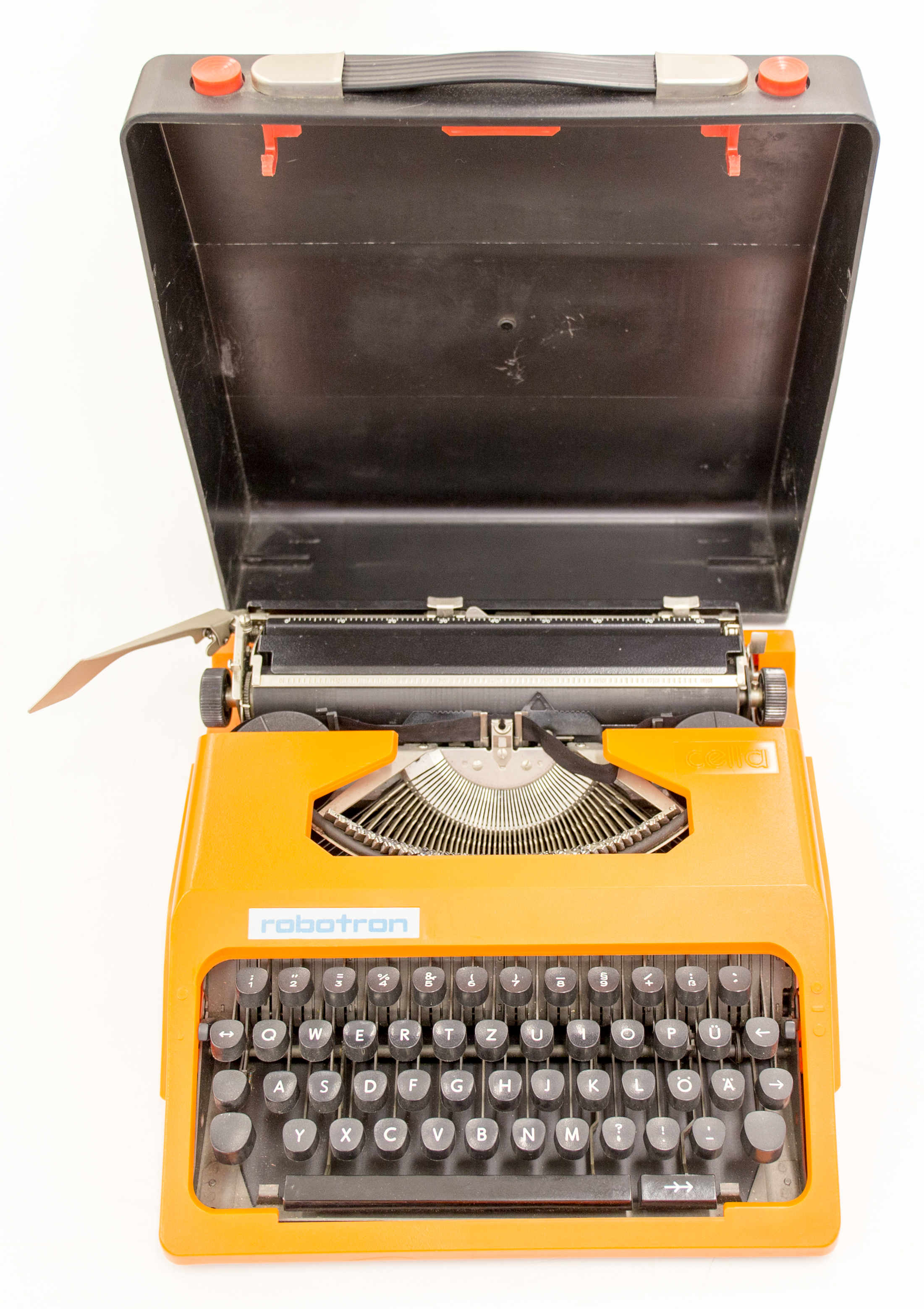 Schreibmaschine robotron S 1001 Indetifikations-Nr.: N (9 A) 395/1997 Datierung: 1980er Jahre Herstellungsort: Zella-Mehlis, DDR Hersteller: VEB Robotron-Elektronik Zella-Mehlis Höhe x Breite x Tiefe: geschlossen 9,5 x 31 x 33,5 cm Ausgabe: Kunststoff, Metall Zustand: 2. leichte Schäden / befriedigend Beschreibung: Tragbare, mechanische Schreibmaschine „robotron S 1001“ der „VEB Robotron-Elektronik“ mit integriertem Koffer-Deckel